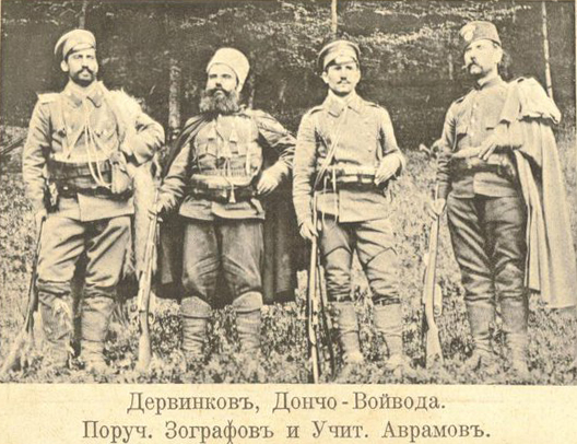 Войводите на Беласишкия отряд на Върховния комитет Петър Дървингов, Дончо Златков, Димитър Зографов и Кочо Аврамов по време на Илинденско-Преображенското въстание.